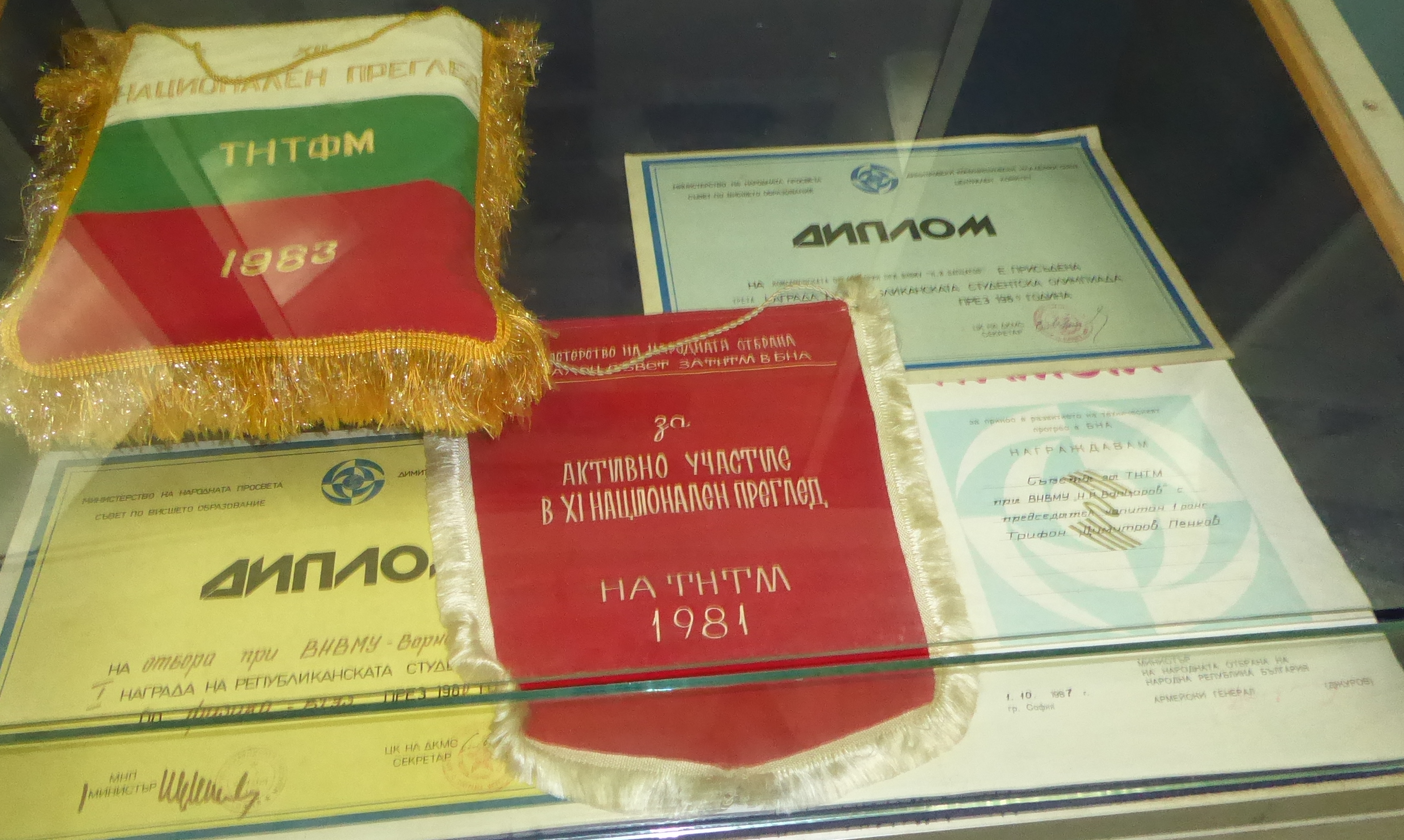 Marineakademie Warna-Auszeichnungen - Olympiaden, TNTM, TNTFM